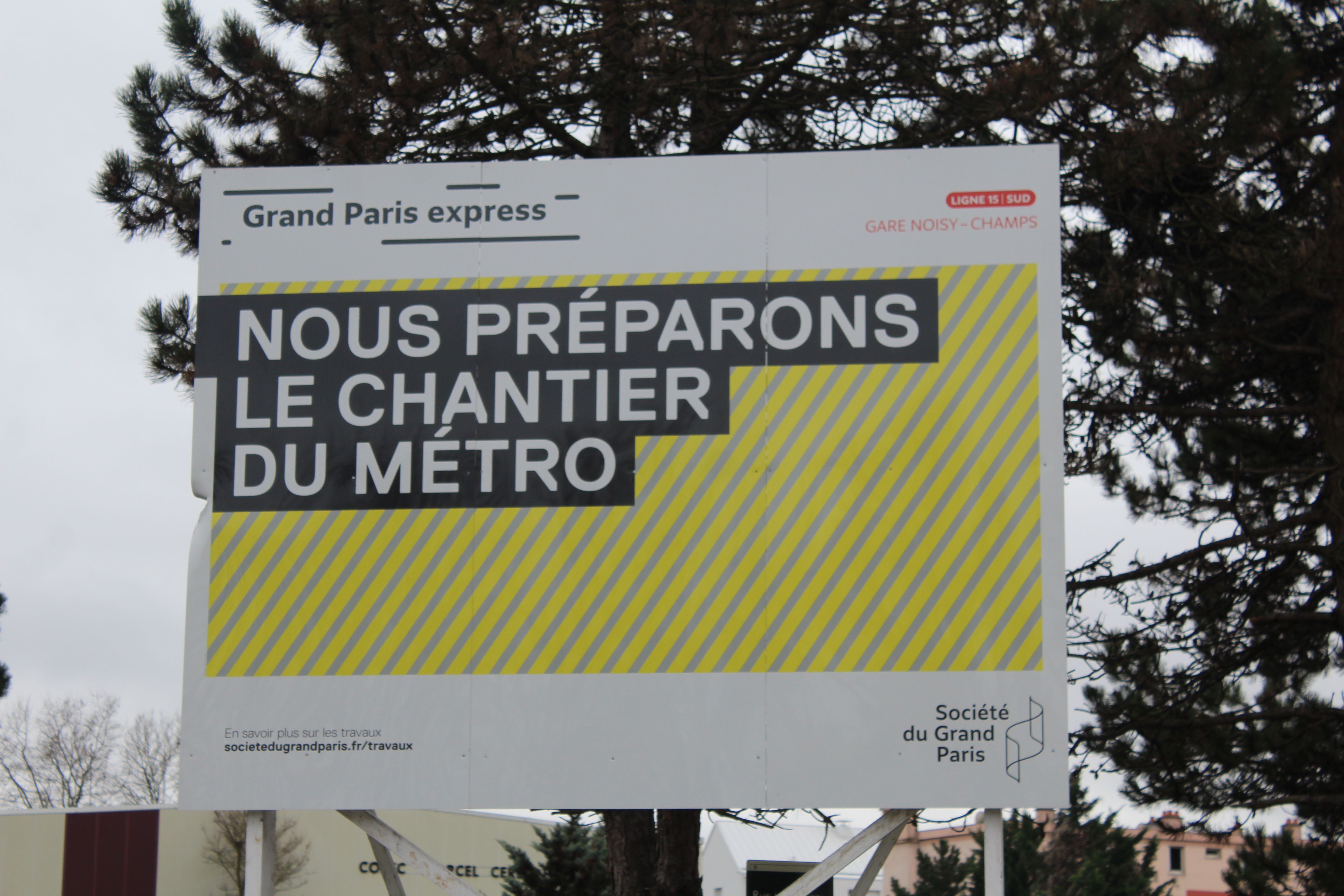 Panneau "Nous préparons le chantier du métro" à l'intersection entre le boulevard du Ru de Nesles et la rue Jules Ferry à Noisy-le-Grand.